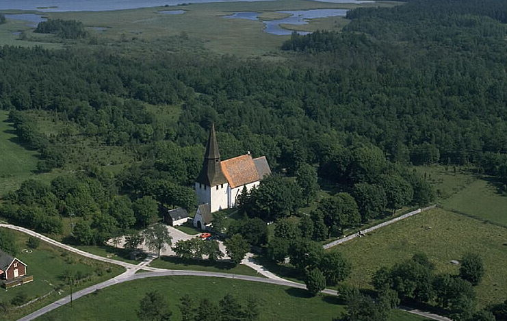 Motiv: Hellvi kyrka Nyckelord: Flygbilder, Riksintressen Kategori: KyrkomiljöHellvi kyrka